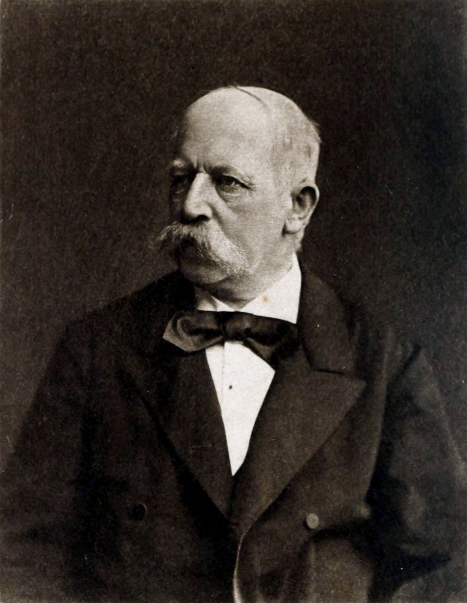 Depicted person: Robert Volkmann